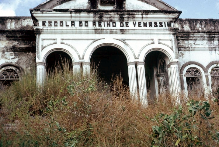 A escola encntrava-se abandonada.Obra do Administrador Pinto Correia.